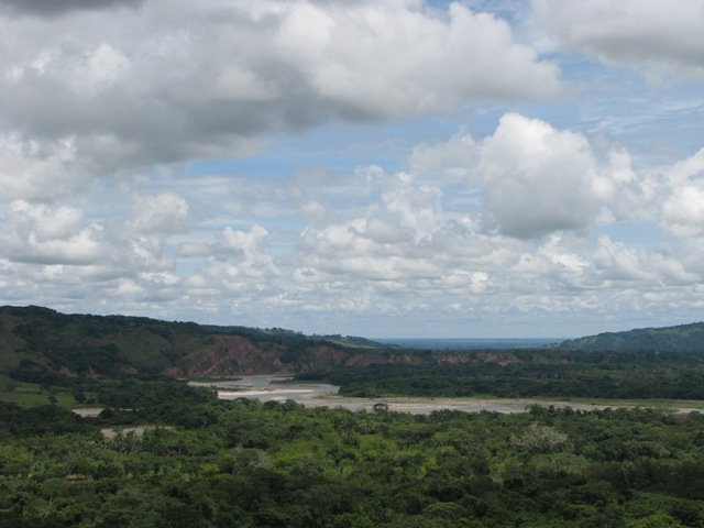 Vista desde la finca el Refugio en Casanare Colombia